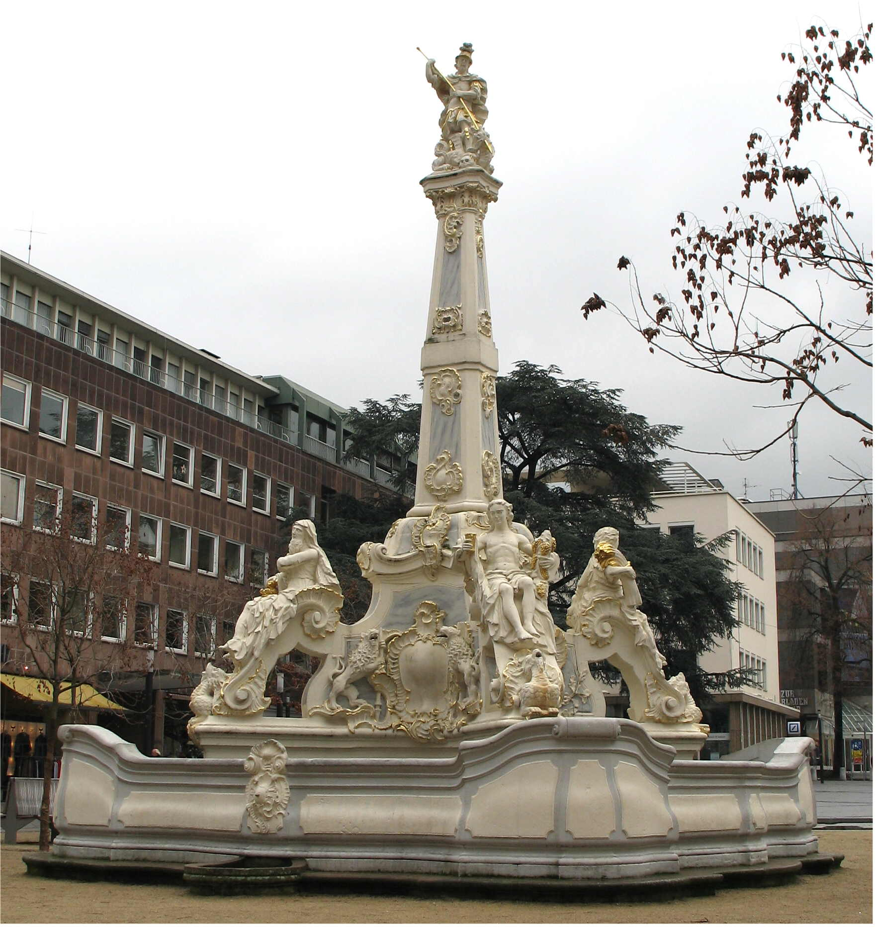 Den Hl. Georg Pëtz zu Tréier.